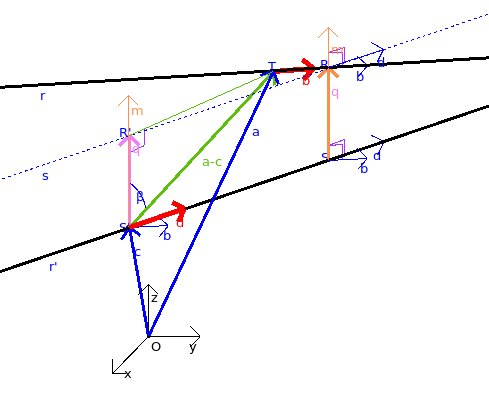 Rette nello spazio